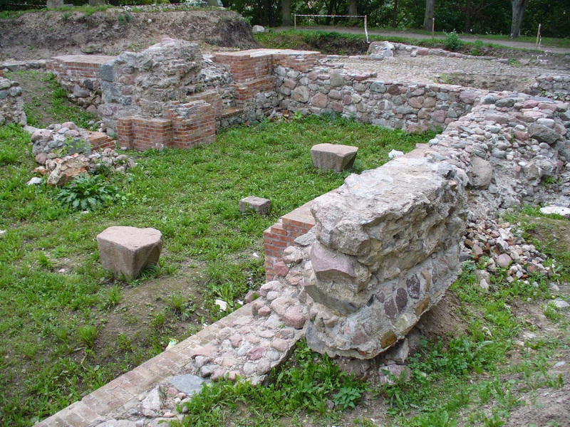 Zamek, Dzierzgoń, Polska